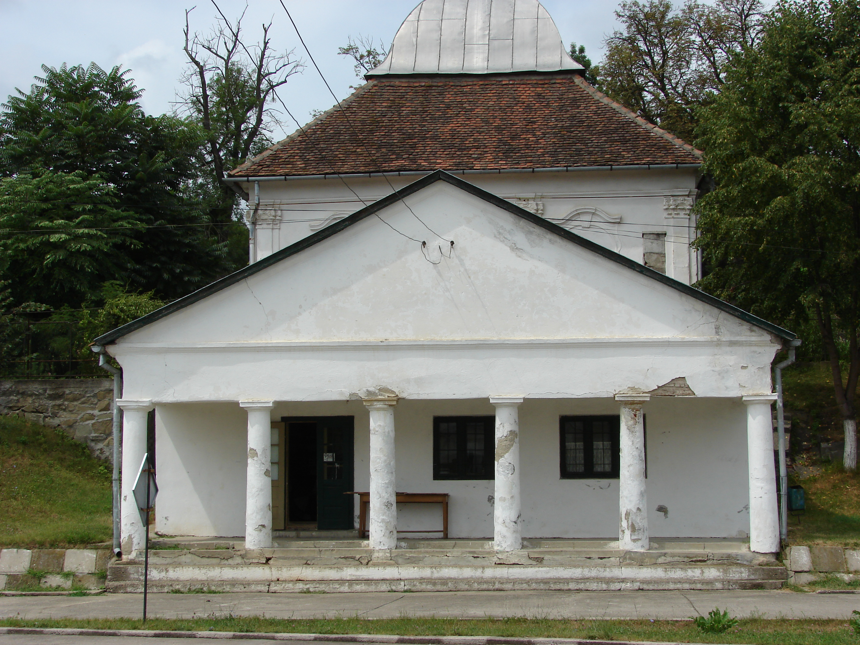 Poza 4